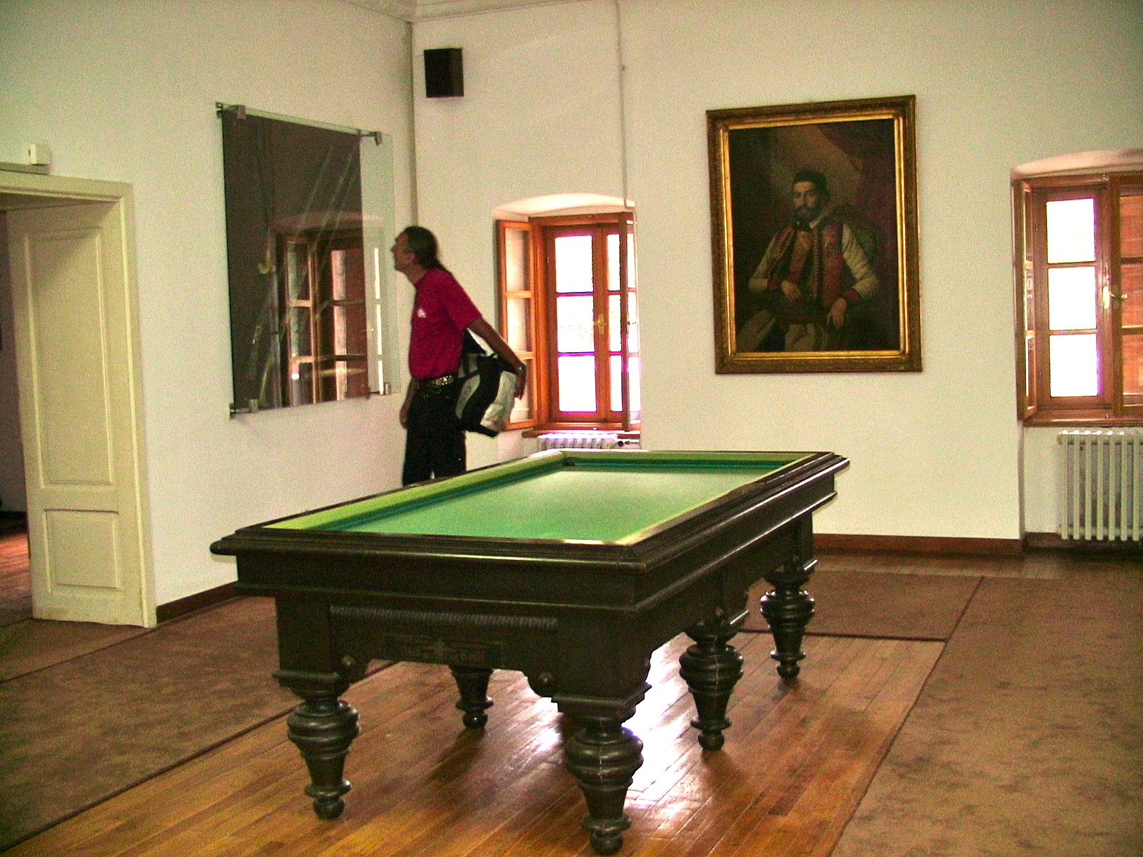 Cetinje